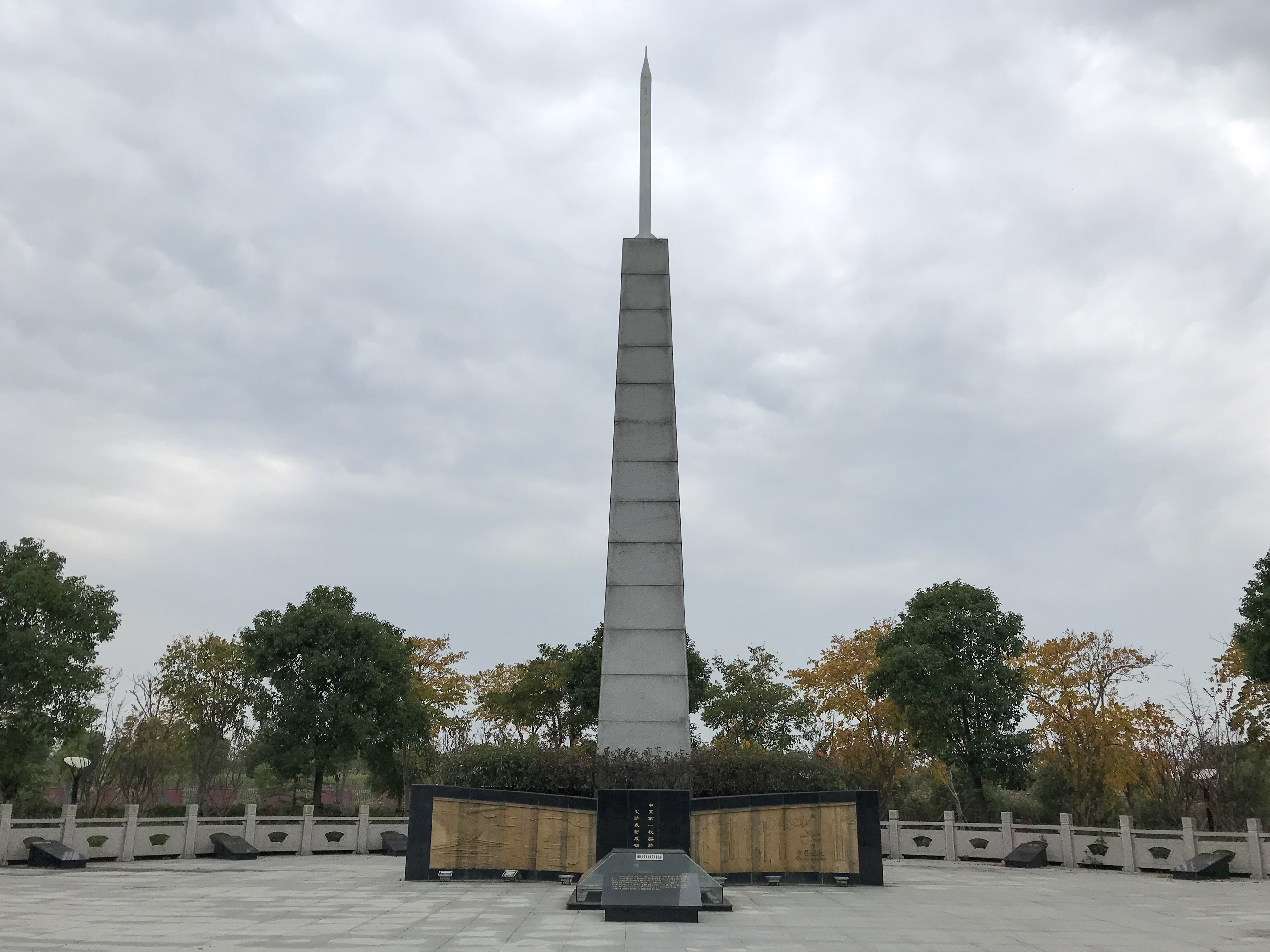 中文（中国大陆）: 中国第一枚自行设计制造的试验探空火箭T-7M发射场遗址 老港镇东进村2组